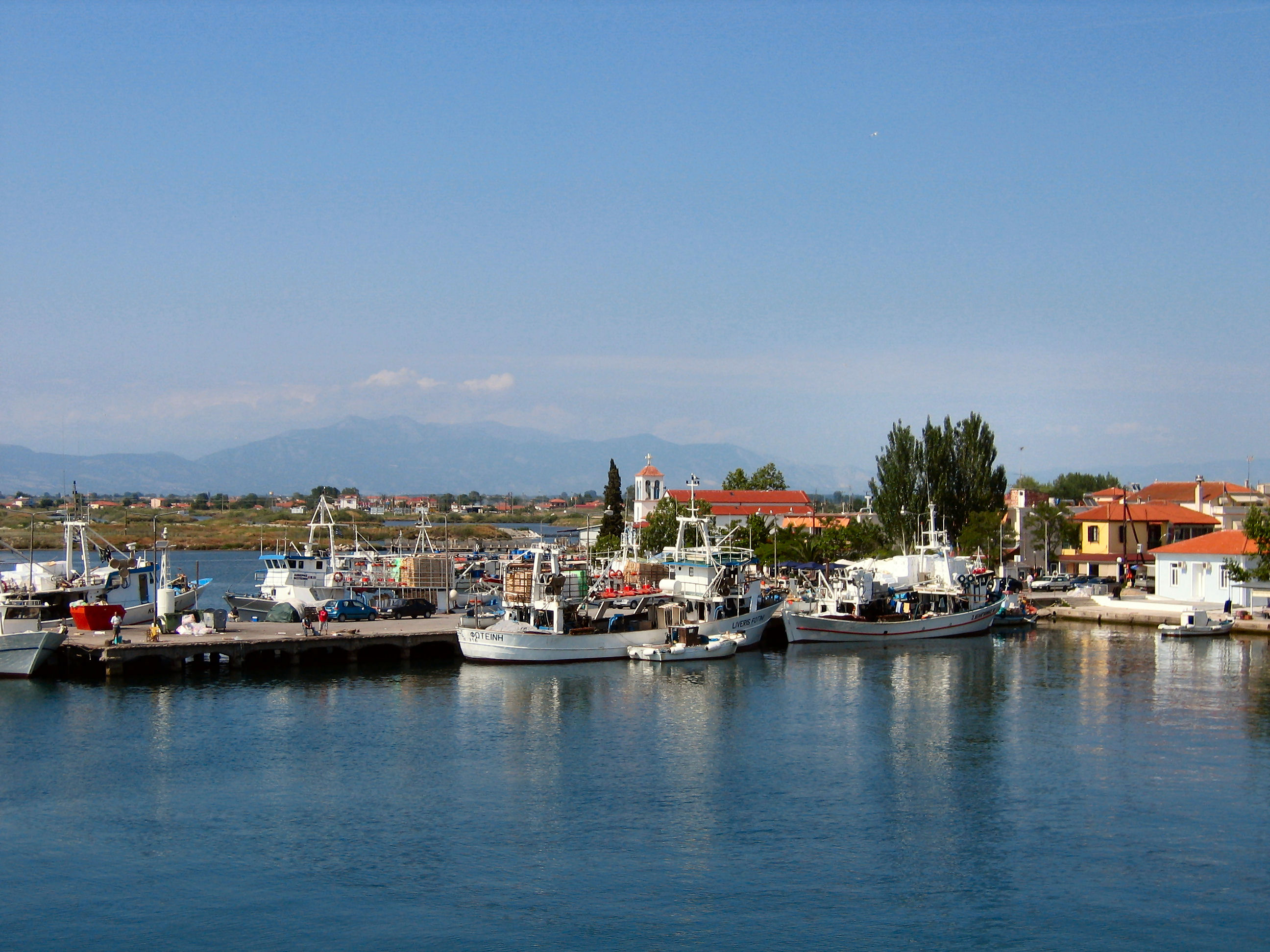 KERAMOUTI HARBOUR. GREECE.